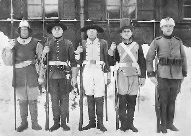 Porin rykmentin univormut